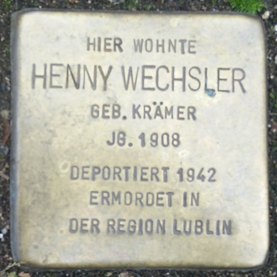 Bad Vilbel, Stolperstein Henny Wechsler